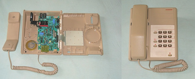 Tastentelefon offen und geschlossen